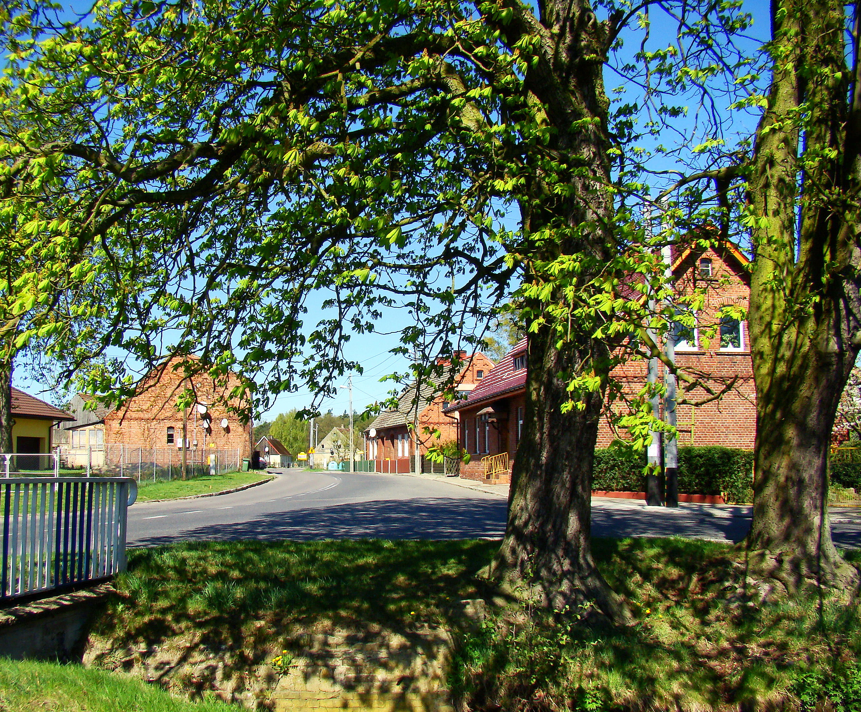 Uniemyśl, (Gmina Police, Województwo zachodniopomorskie), Polska